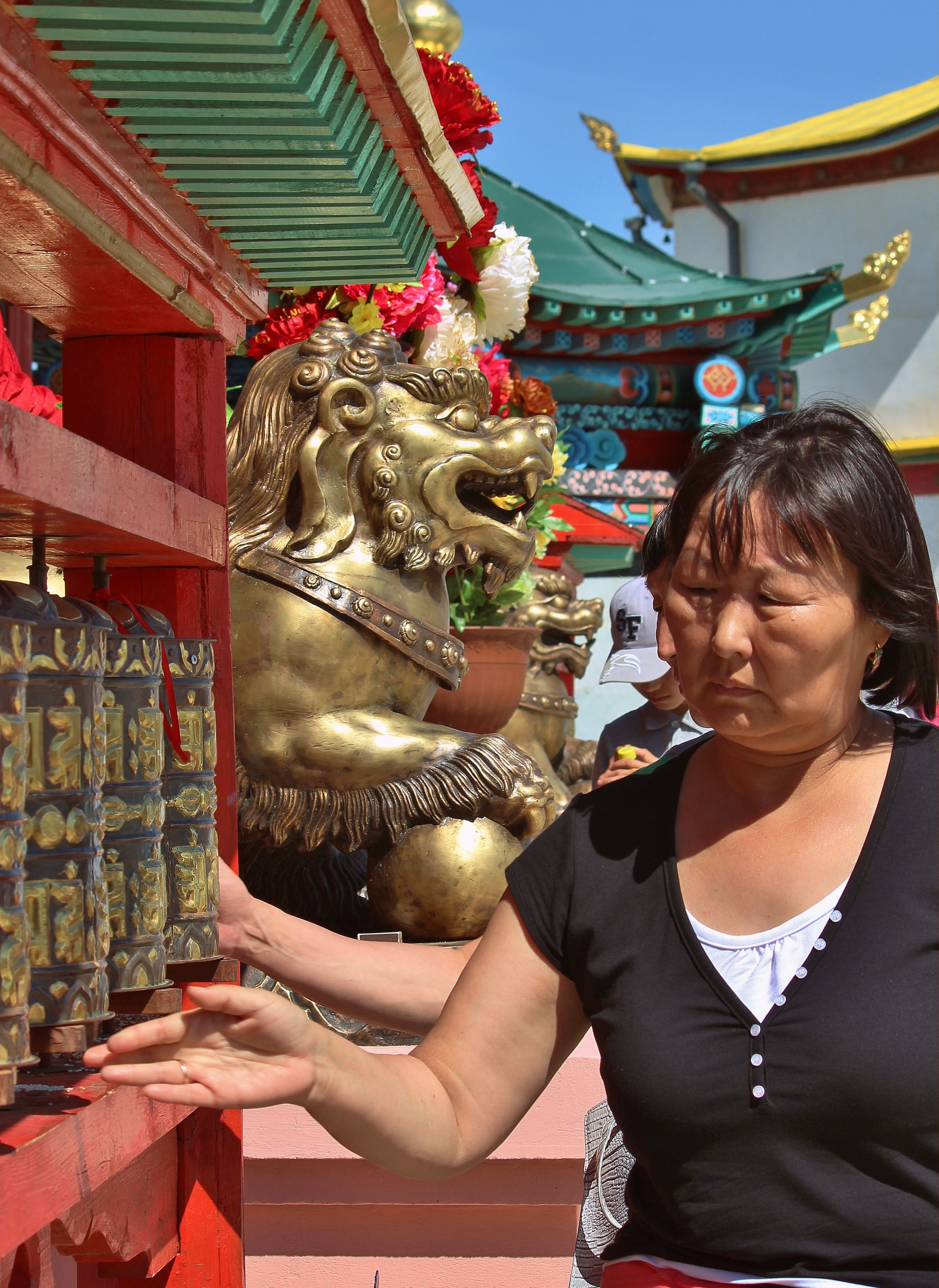 В Иволгинском дацане. Бурятия.